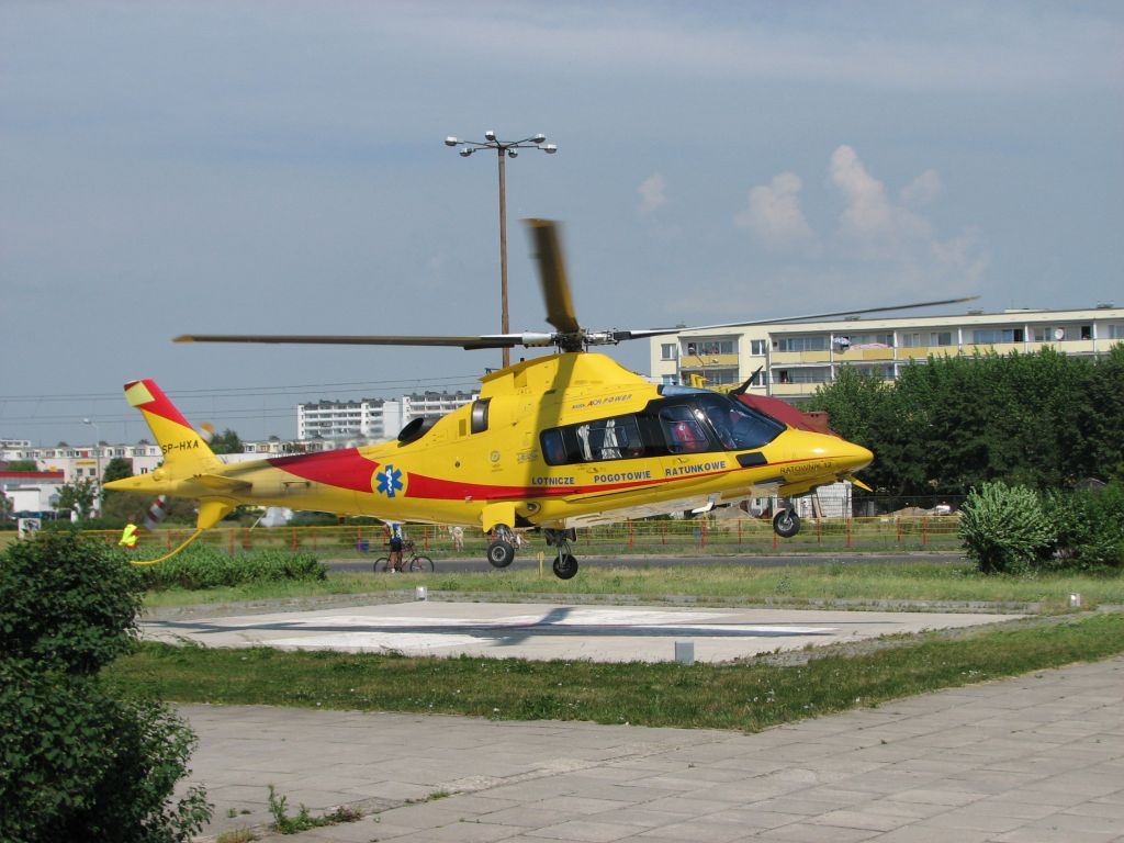 Śmigłowiec HEMS Agusta A109 Power